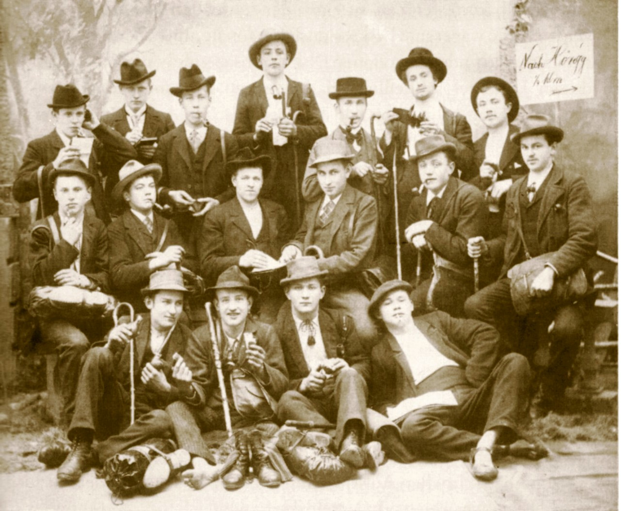 Fotografie deutscher Sozialdemokraten in der Schweiz von 1897